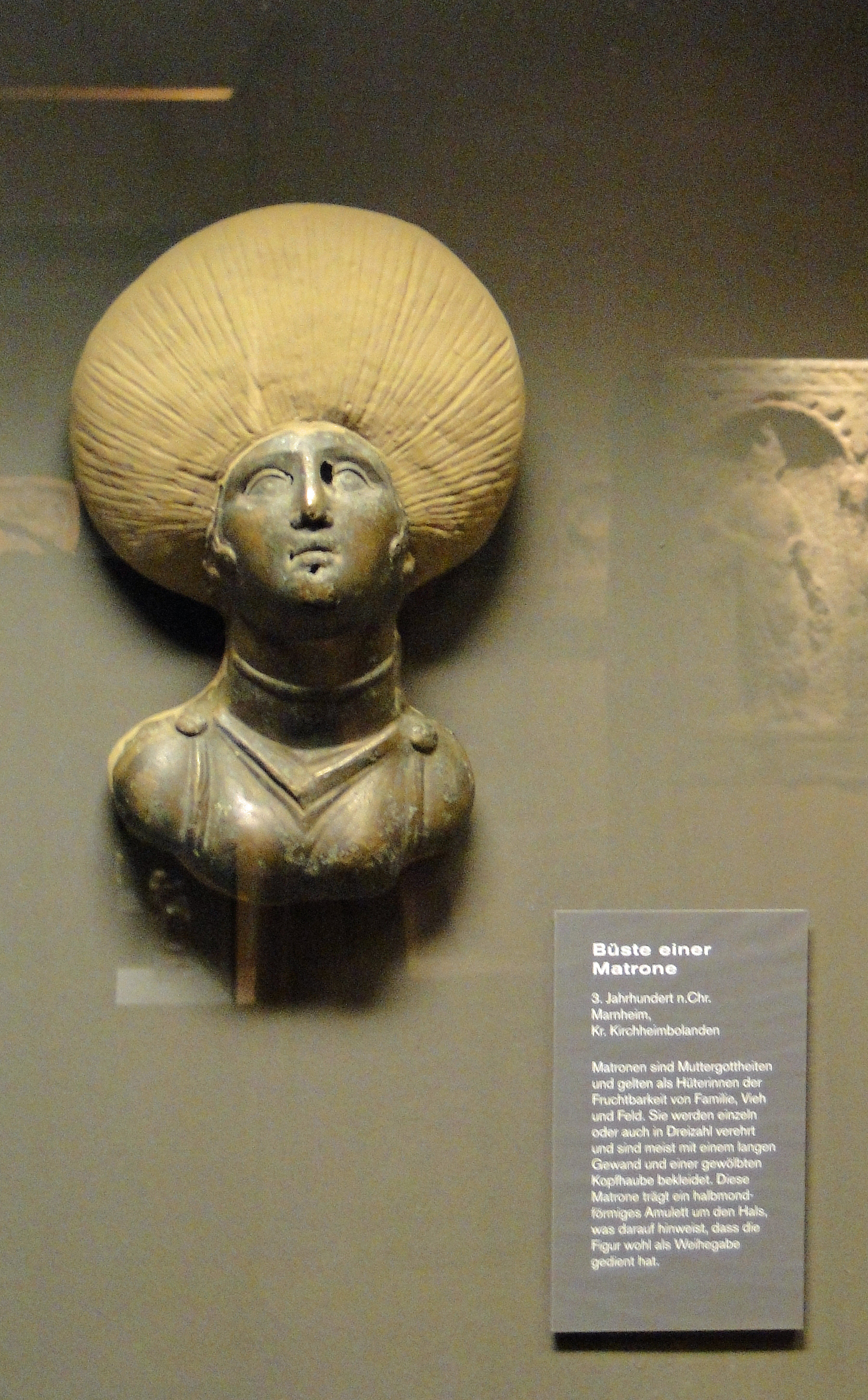 Büste einer Matrone, Marnheim (Kreis Kirchheimbolanden), 3. Jhd. n. Chr., im Historischen Museum der Pfalz (Dauerausstellung), Speyer, Rheinland-Pfalz.